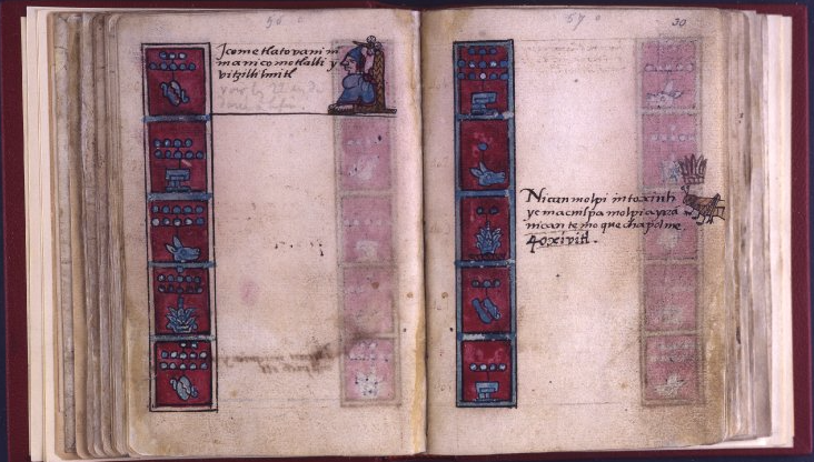 La página de la izquierda muestra la ascensión de Huitzilíhuitl al trono mexica.